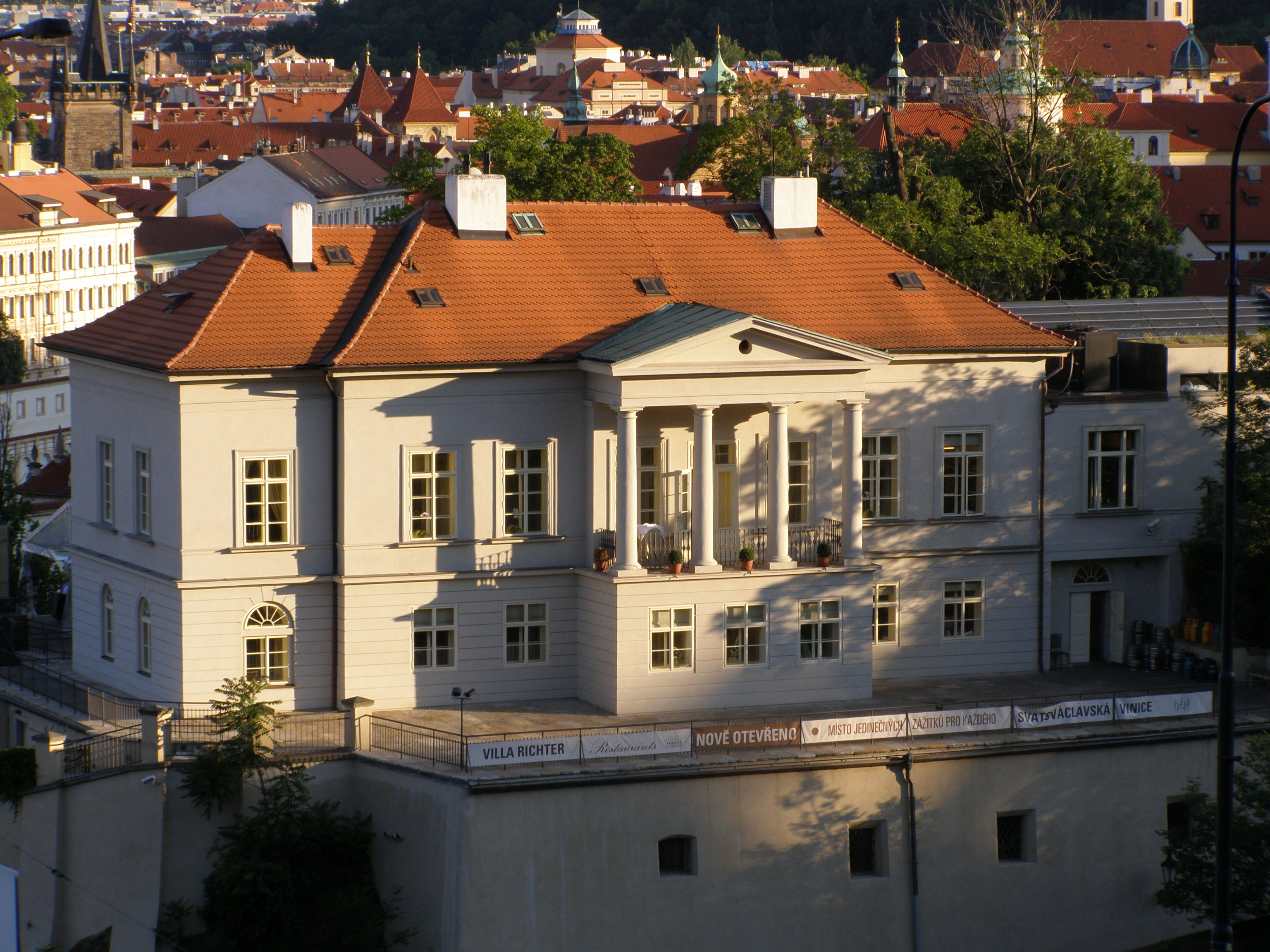 Praha, Malá Strana, Richterova vila, pohled z Chotkových sadů